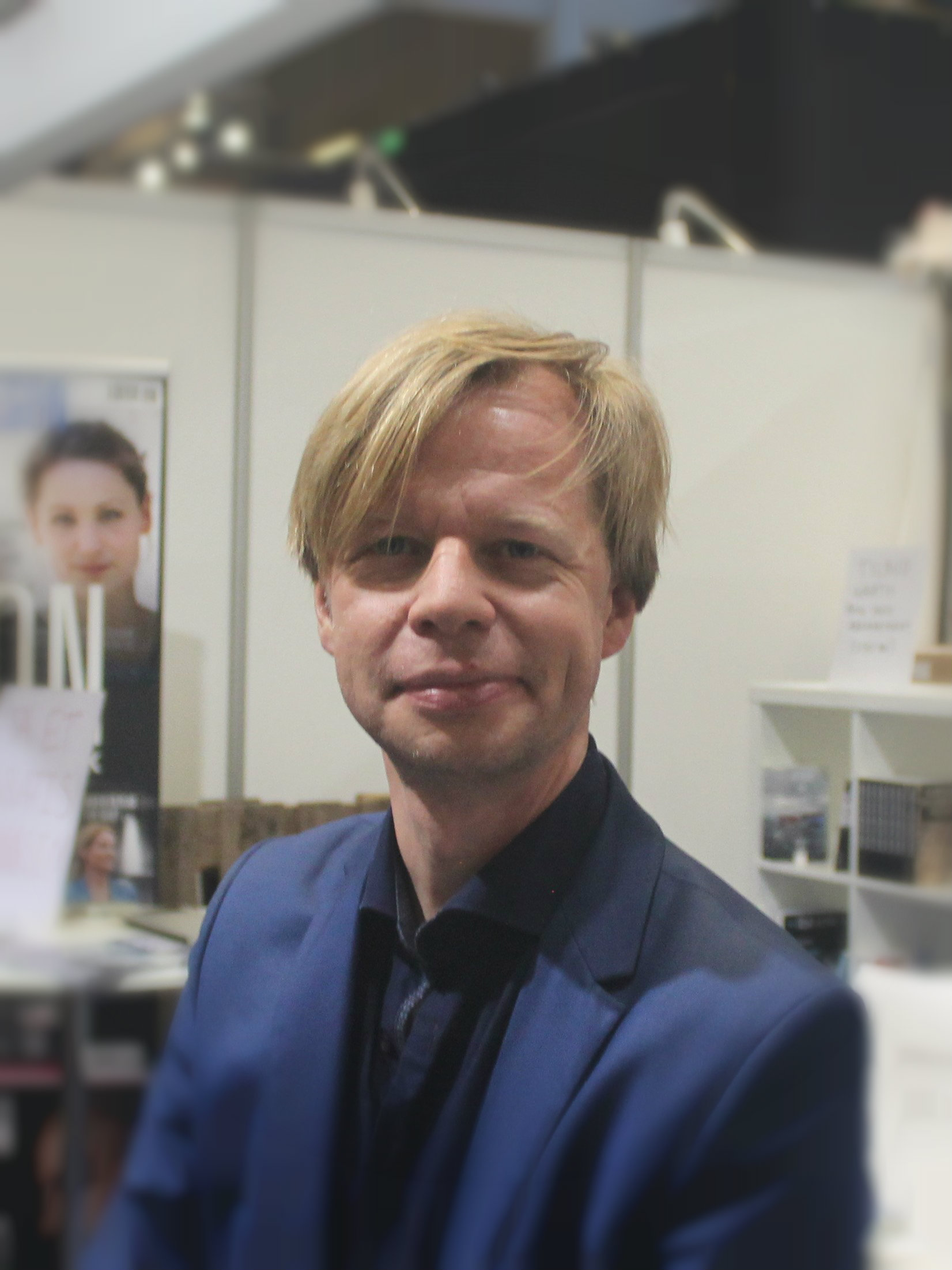 Clement Kjersgaard på Bogforum 2019.